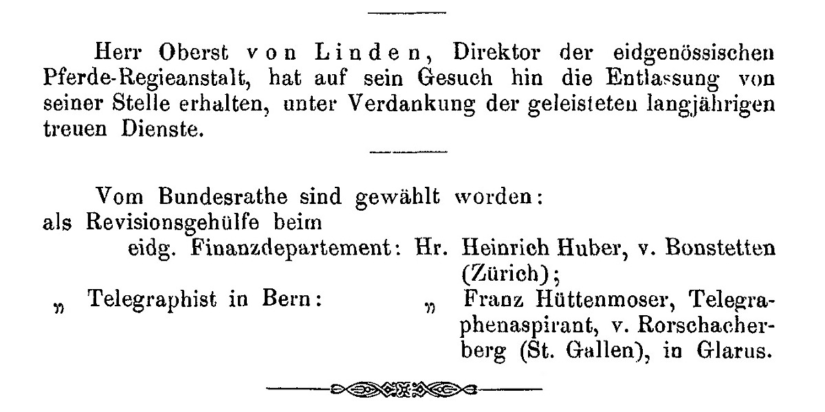 Bundesblatt vom 15. Januar 1887, Seite 85